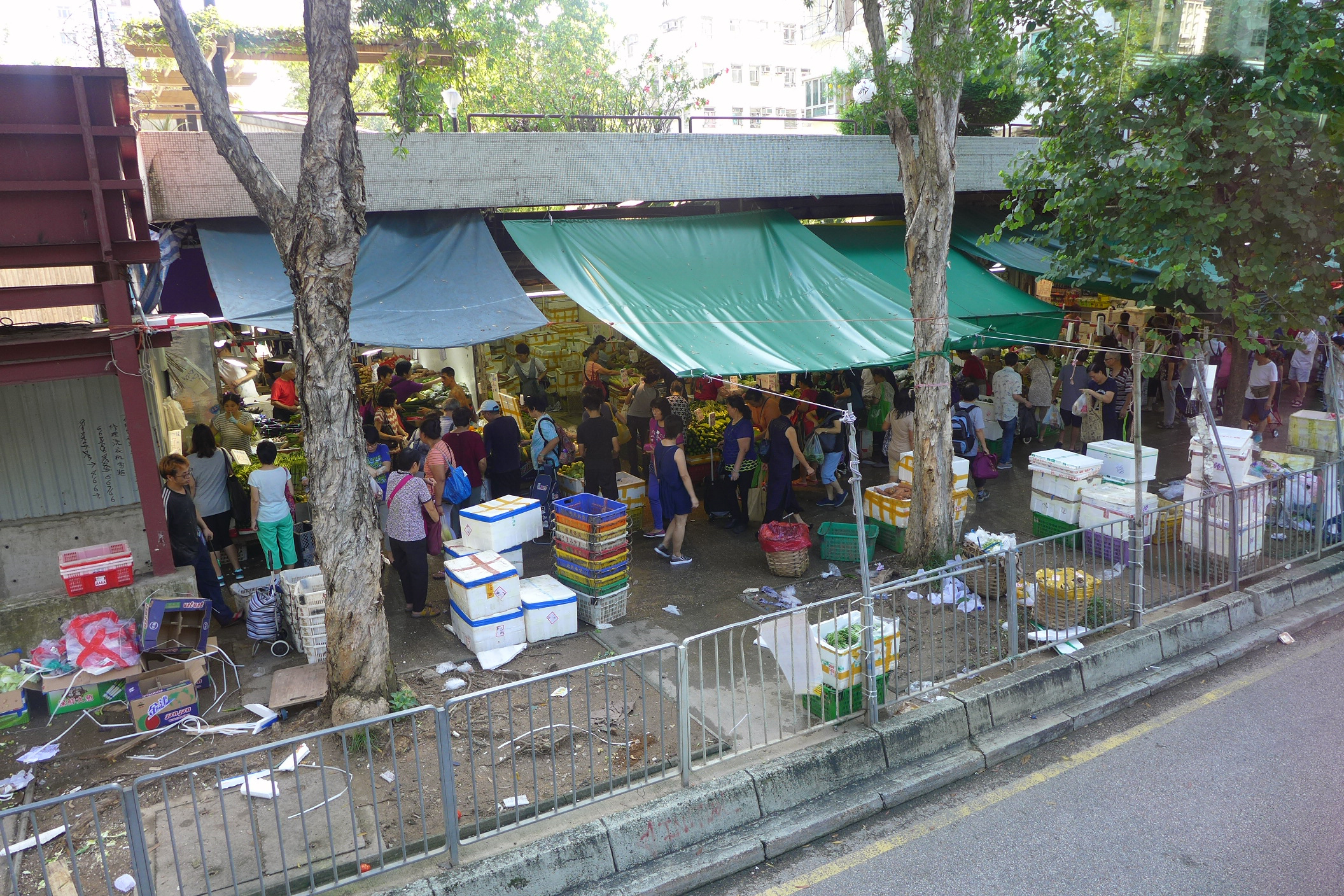 Mei Tin Road wet market